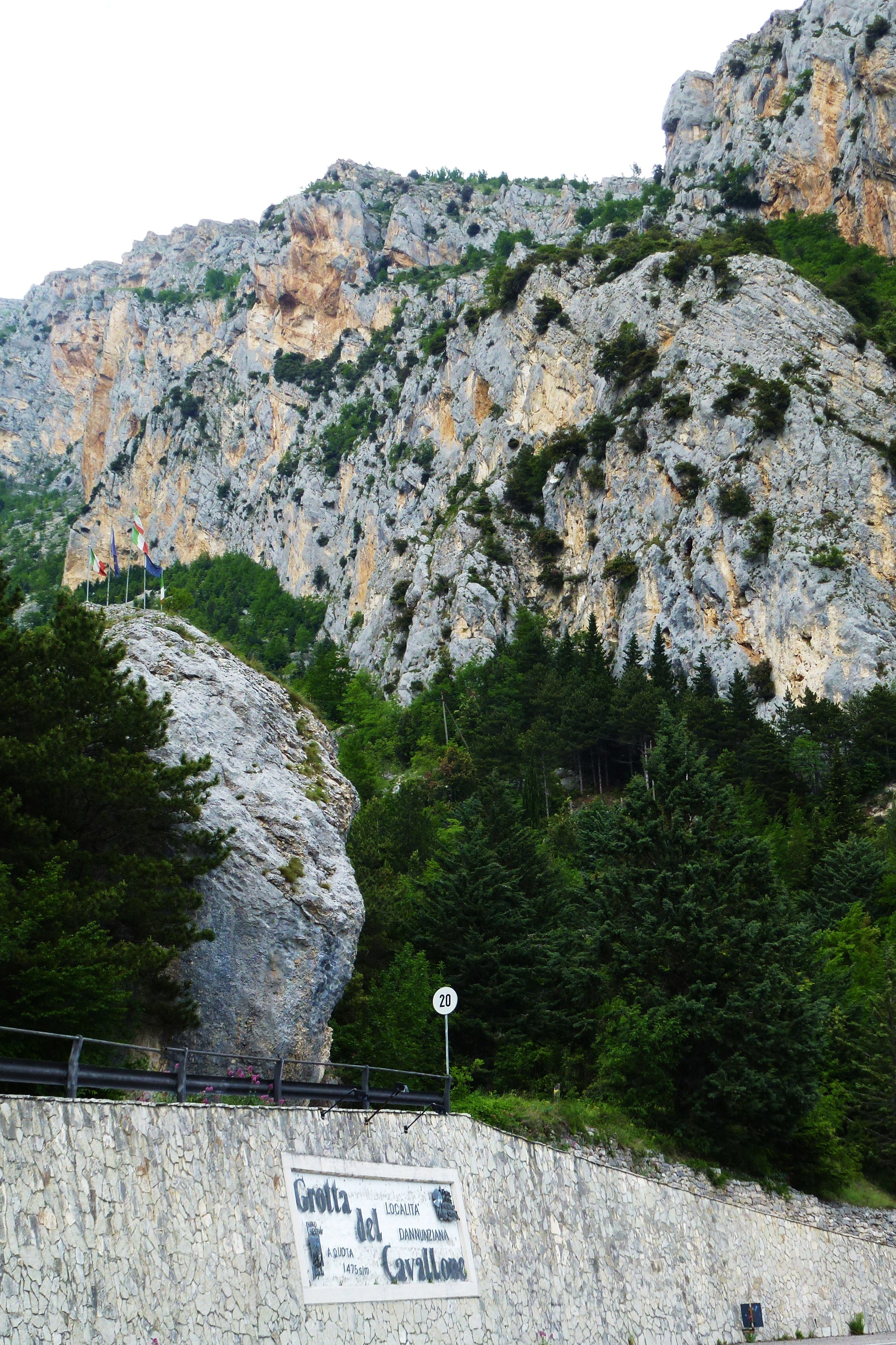 L'entrata delle grotte del Cavallone